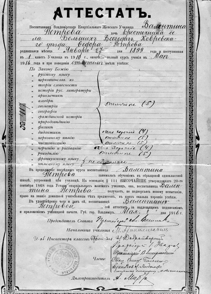 Аттестат об окончании Владимирского епархиального женского училища Валентины Петровой, 1916 год